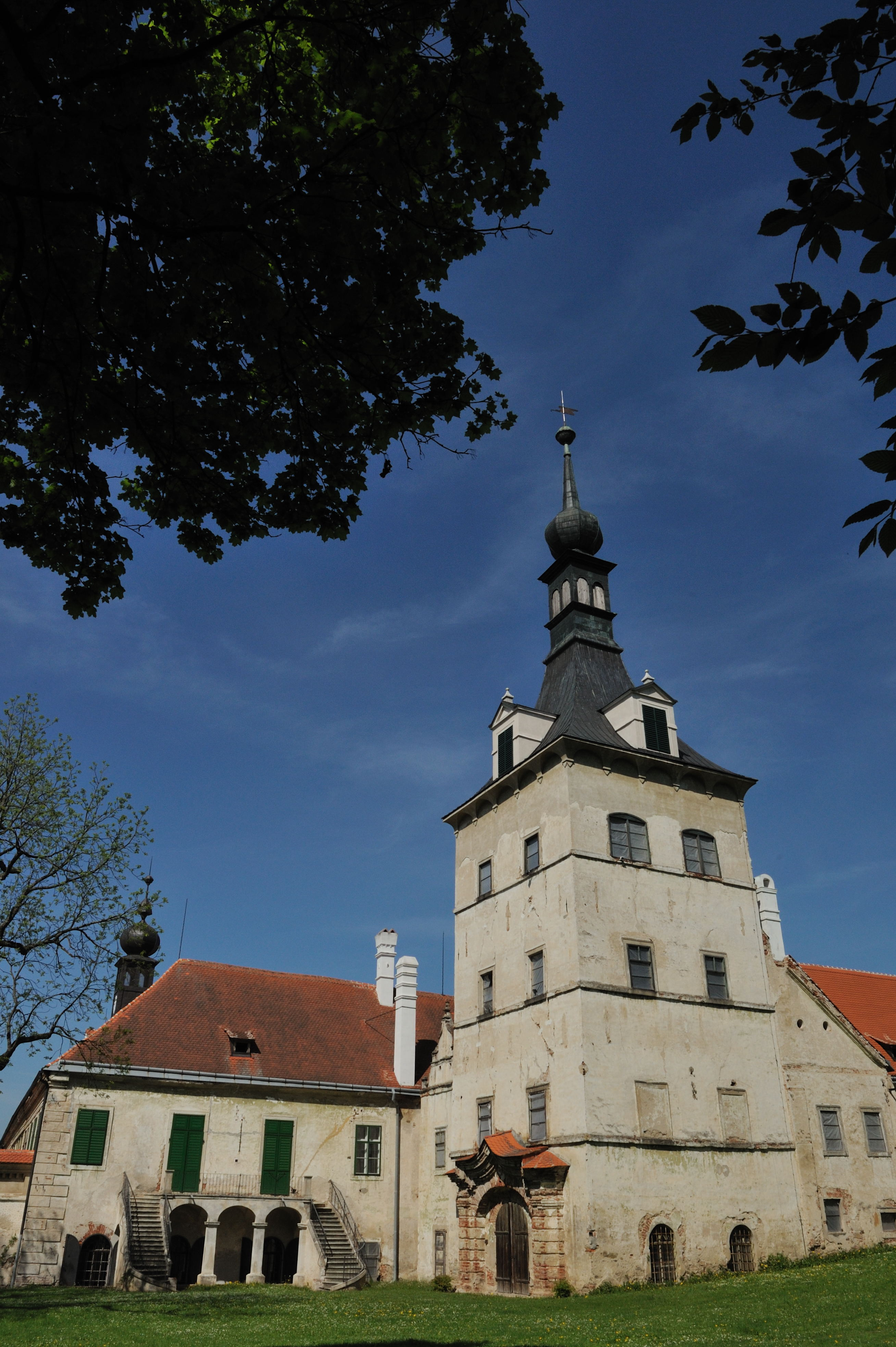 Zámek Uherčice, Uherčice 1